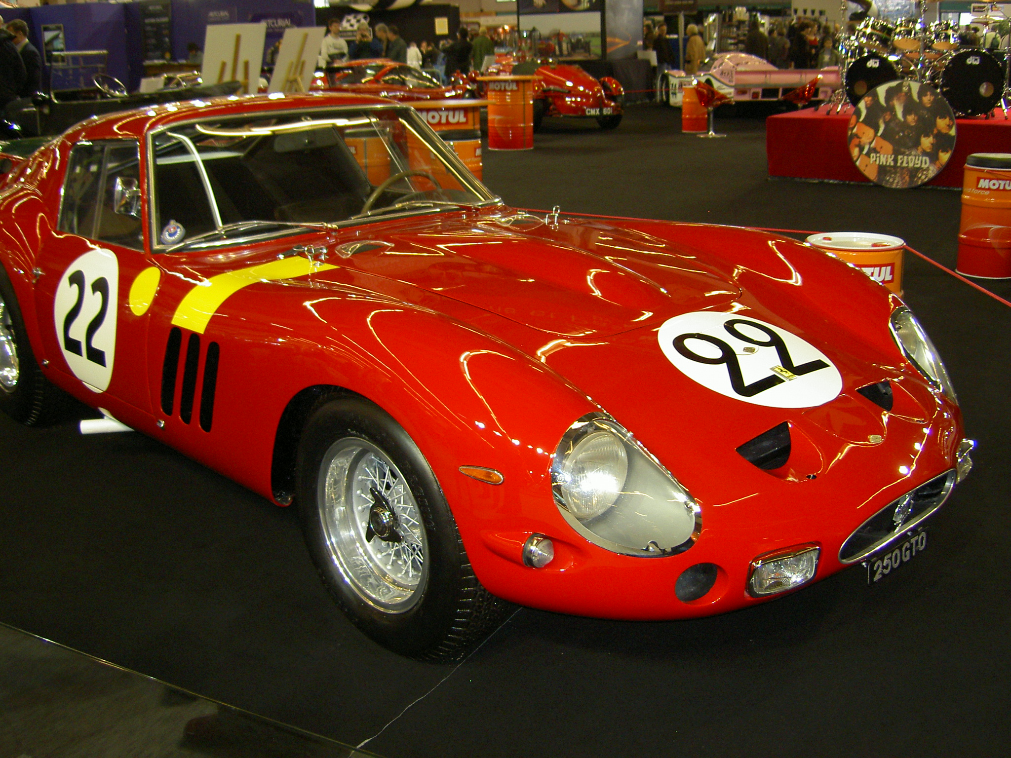 Ferrari 250 GTO (Owner : Nick Mason)